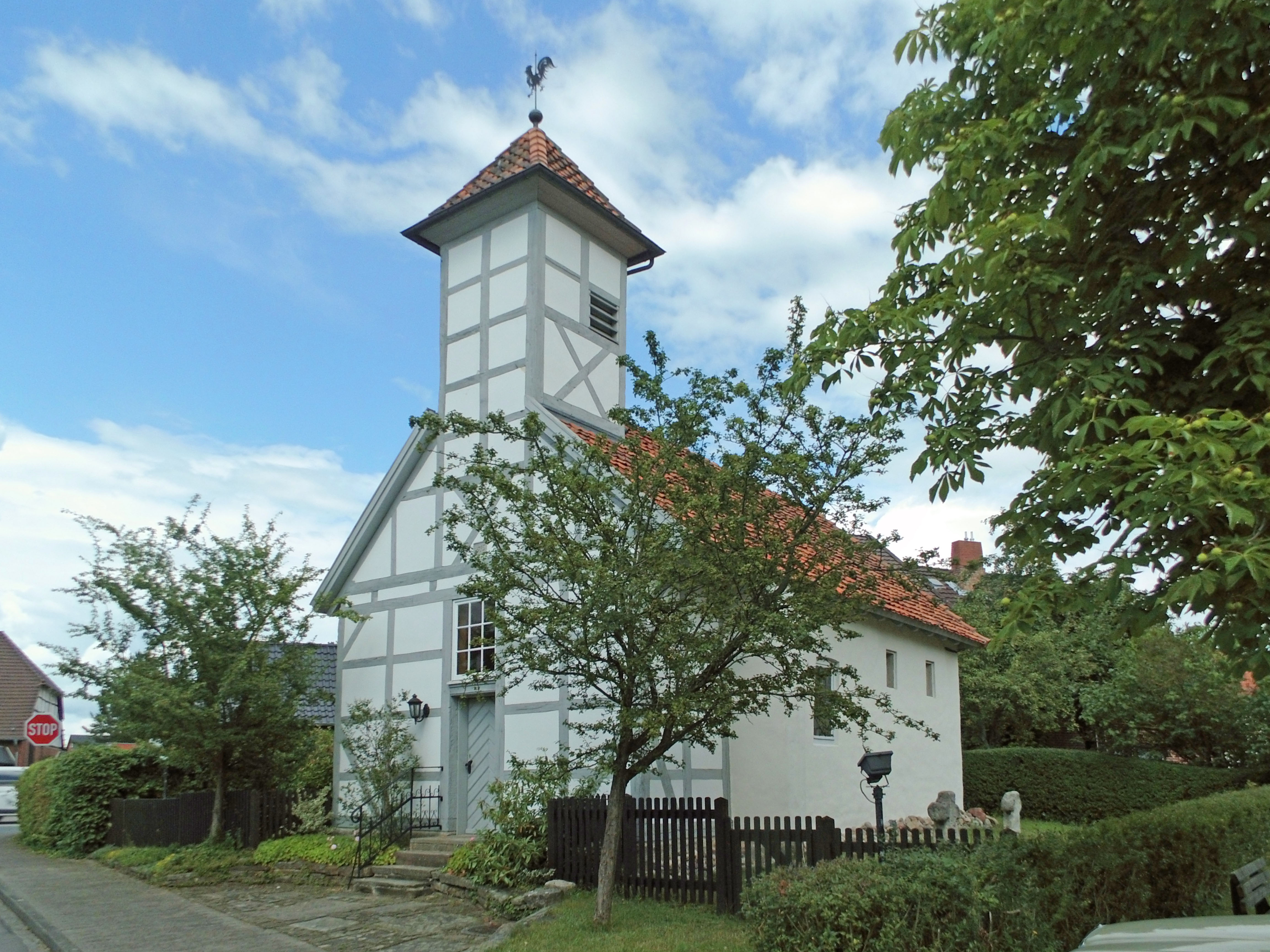 Ev.-luth. Kapelle in Calberlah